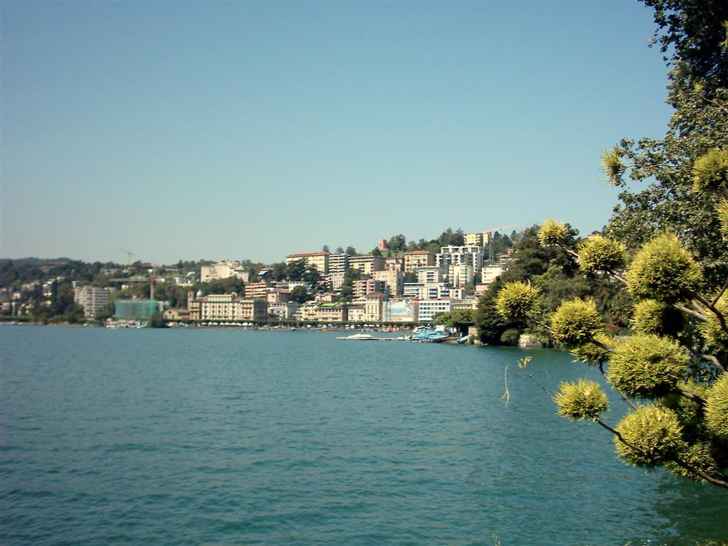 Afbeelding is vrij van auteursrechten, en dus vrij te gebruiken.